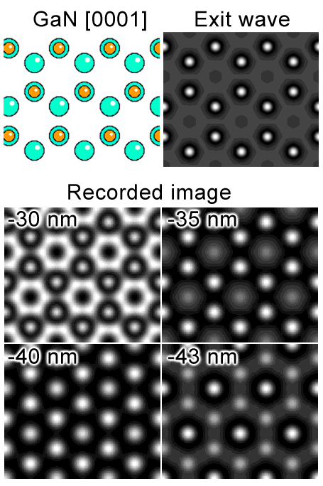 Multslice Simulation von GaN[0001]. Oben: atomares Modell von GaN[0001] und zugehörige Exit-Welle. Die Welle hat am Ort der Gallium und Stickstoff Kolonnen Maxima